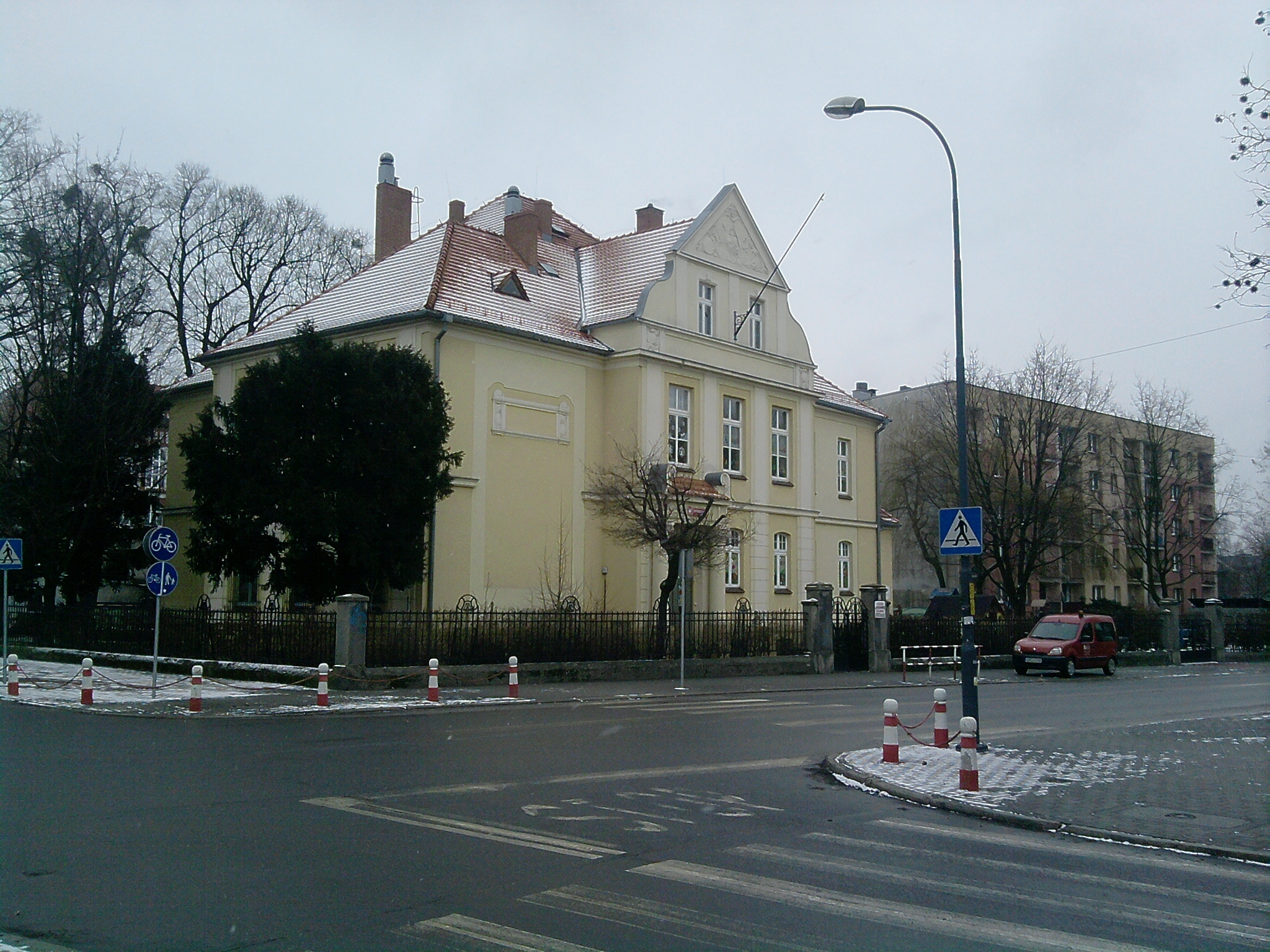 Racibórz, ul. Ogrodowa 31 - Przedszkole nr 10